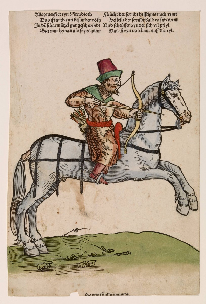 Stradiot auf einem Flugblatt zur Invasion von 1529. Der Text: „Abgebildet ist ein Stradiot; das sind besondere Kämpfer. Im Scharmützel reiten sie ungestüm heran. Flieht der Feind, verfolgen sie ihn heftig; hält er stand, wenden sie sich bald um und schießen viele Pfeile hinter sich. Dieses Volk kämpft nur eilig.“